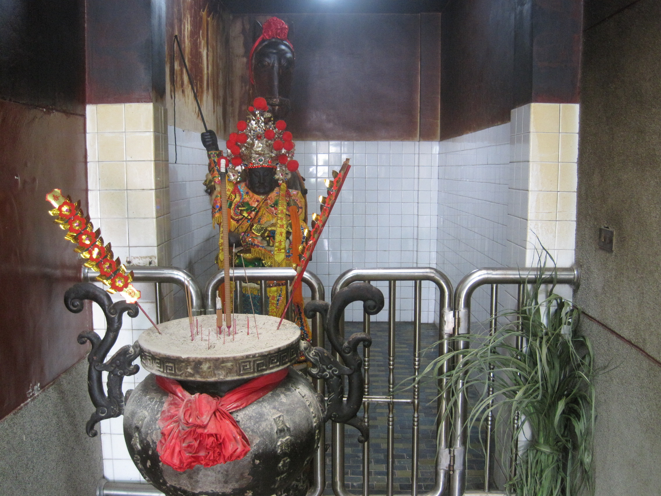 下茄苳旌忠廟馬將軍，後方的是「白馬」神像